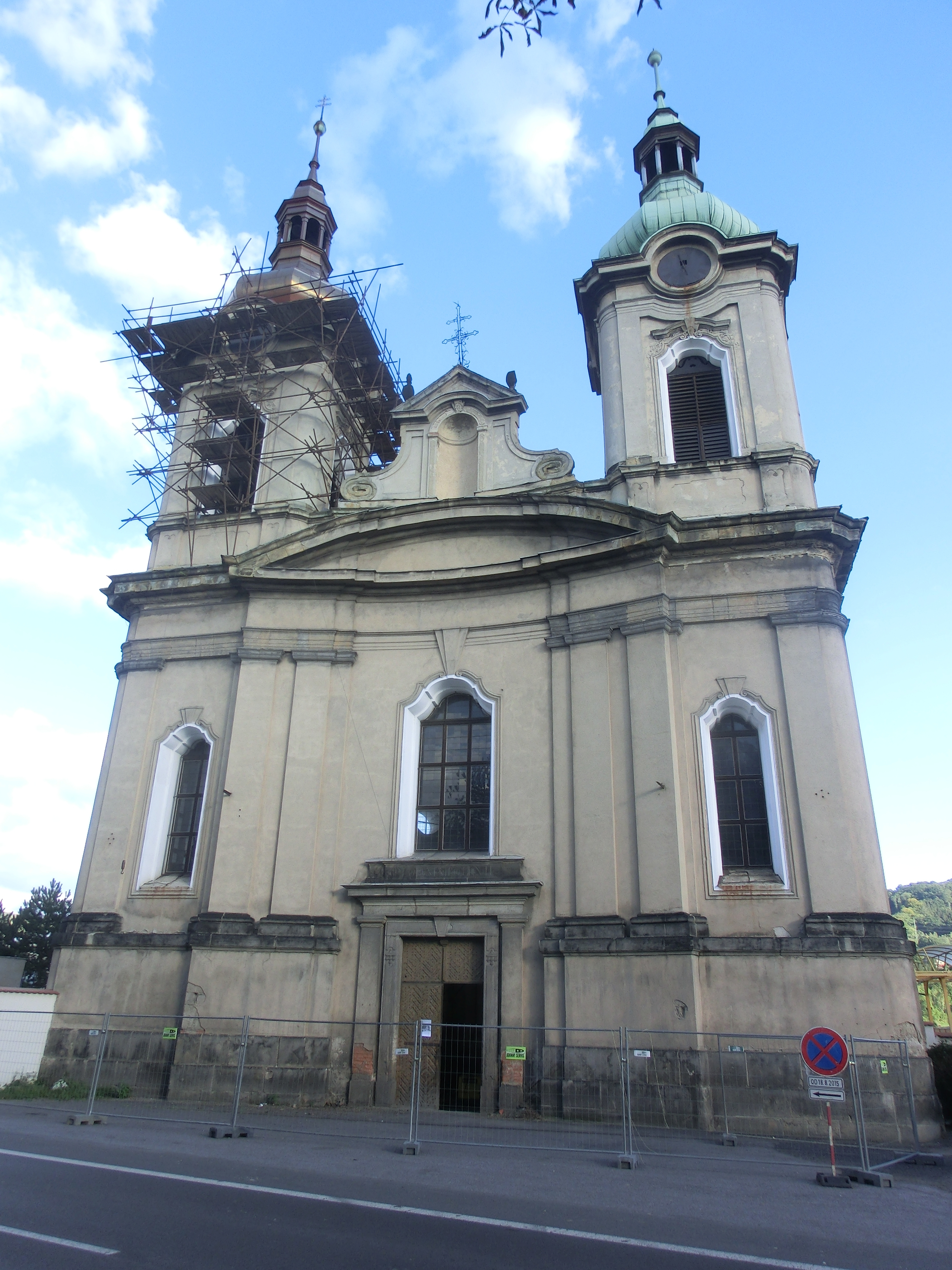 Průčelí kostela sv. Václava v Děčíně-Rozbělesích